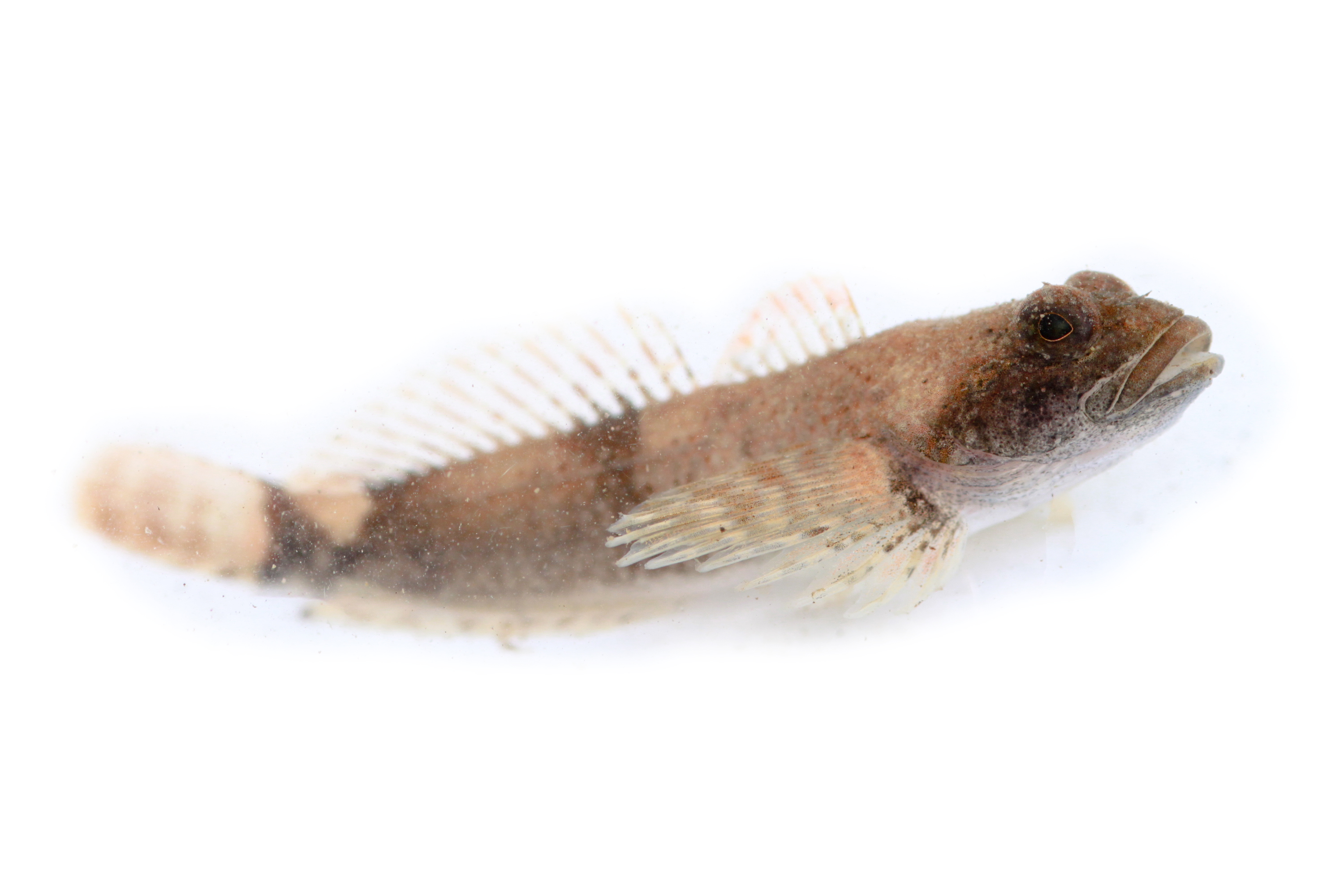 Blue Ridge sculpin - Cottus caeruleomentum